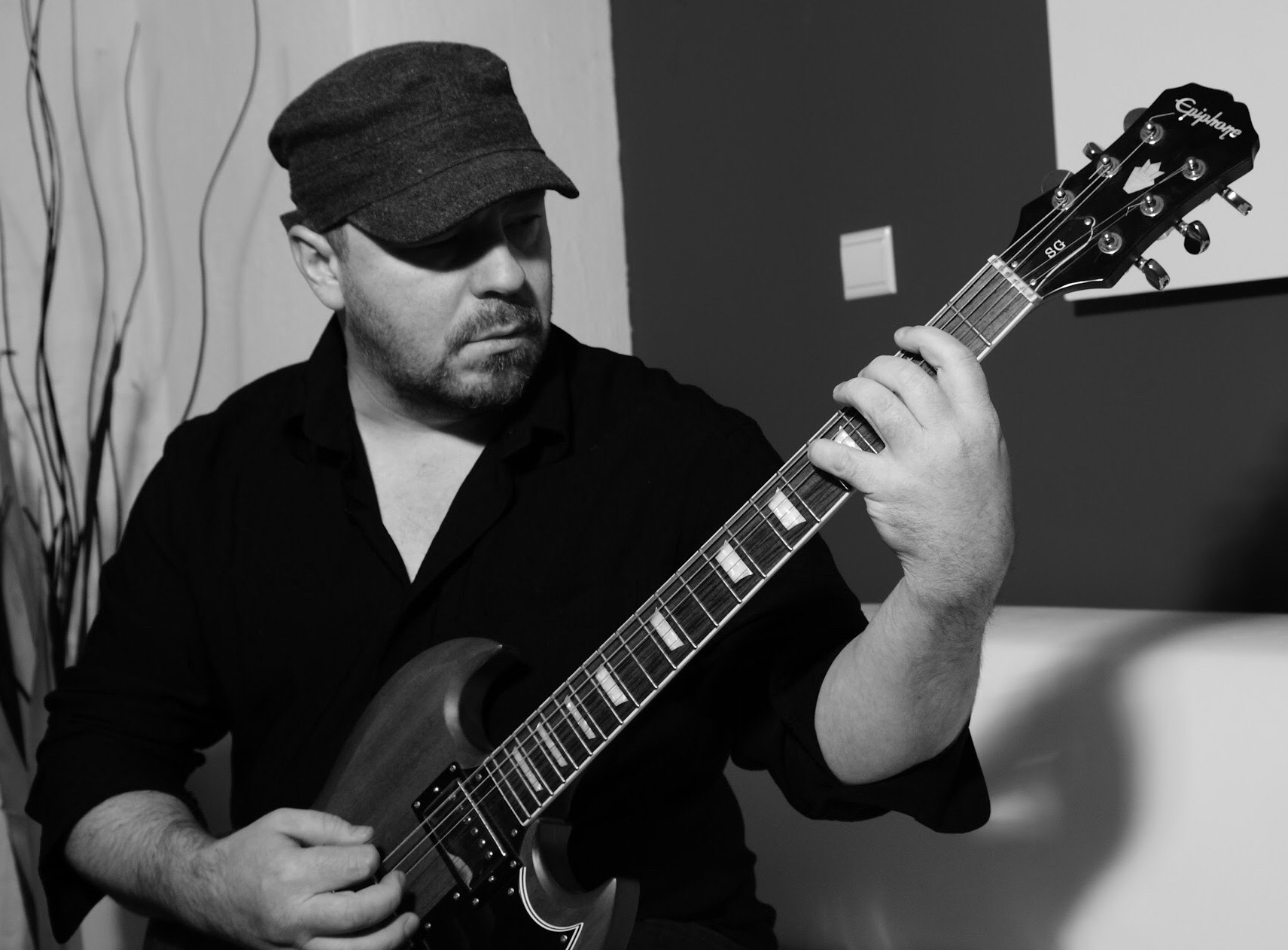 Foto von René Schostak